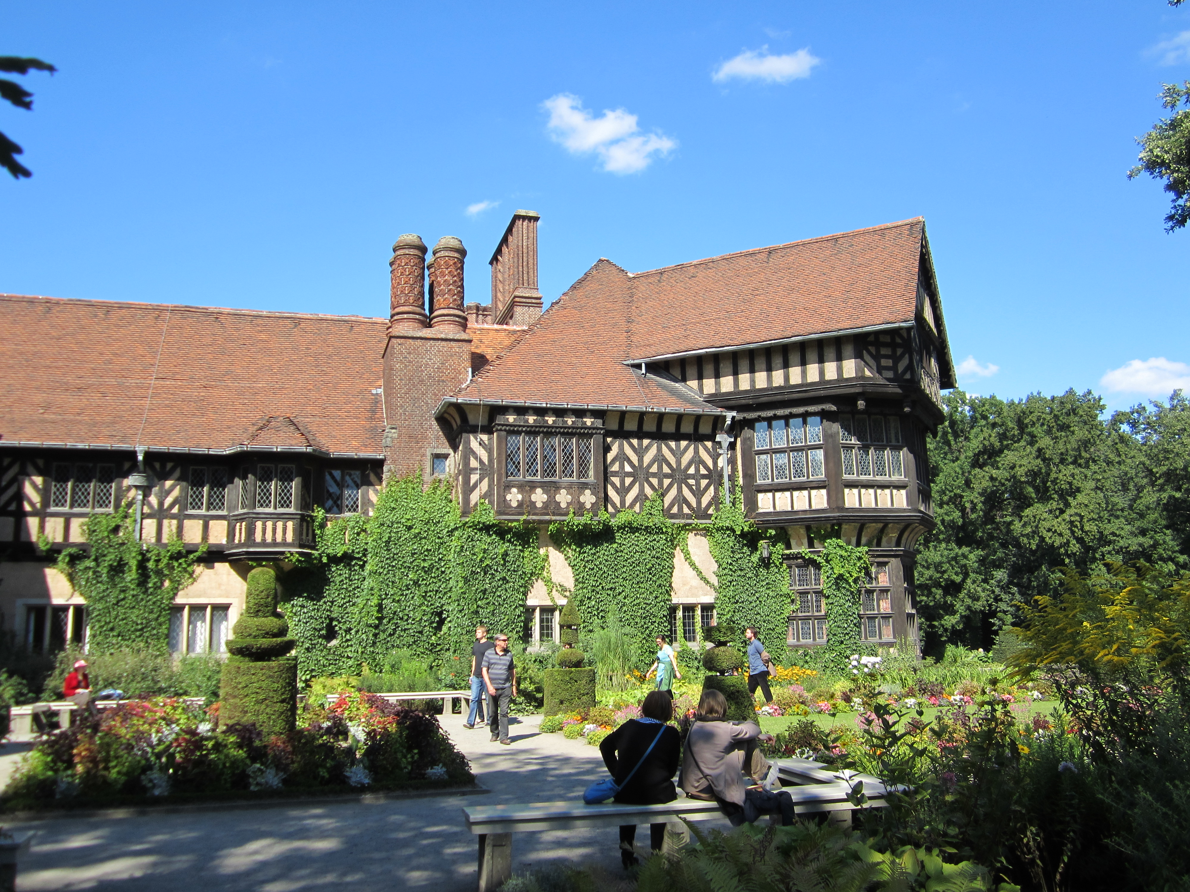 Blumengarten am Schloss Cecilienhof, Potsdam